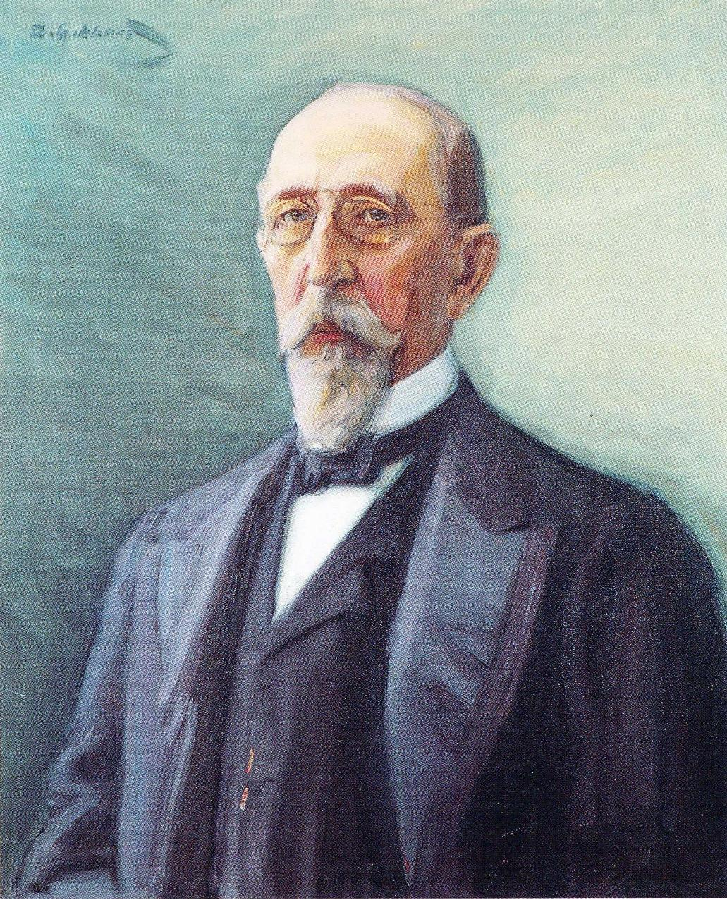 Senaattori Leo Mechelin (1839–1914). Muotokuva kuuluu Helsingin yliopiston kokoelmiin.